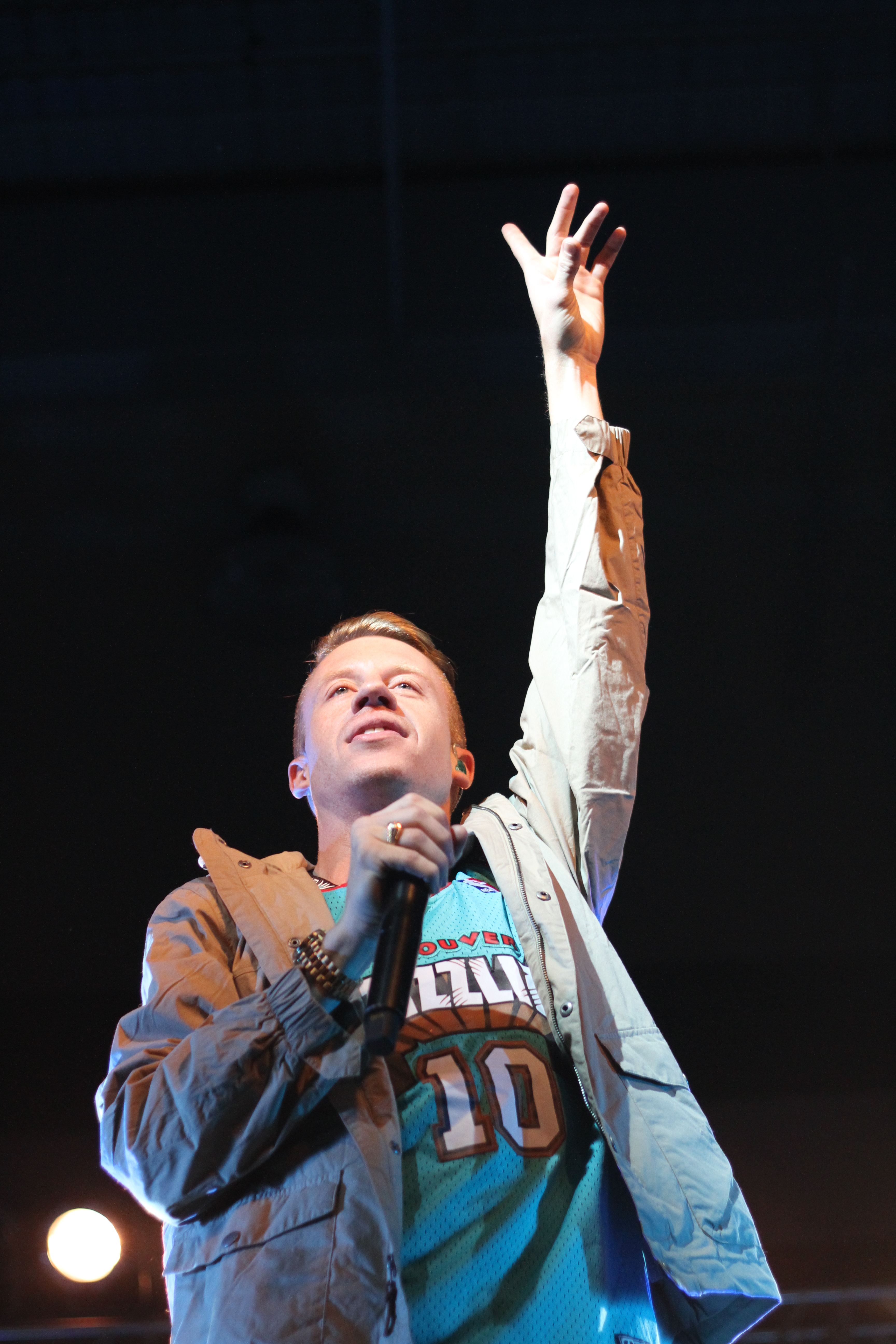 By Amanda Rhoades